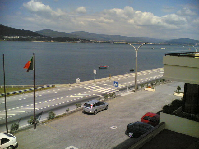 Caminha e o rio Minho, em Portugal. Caminha and the Minho river, in Portugal.